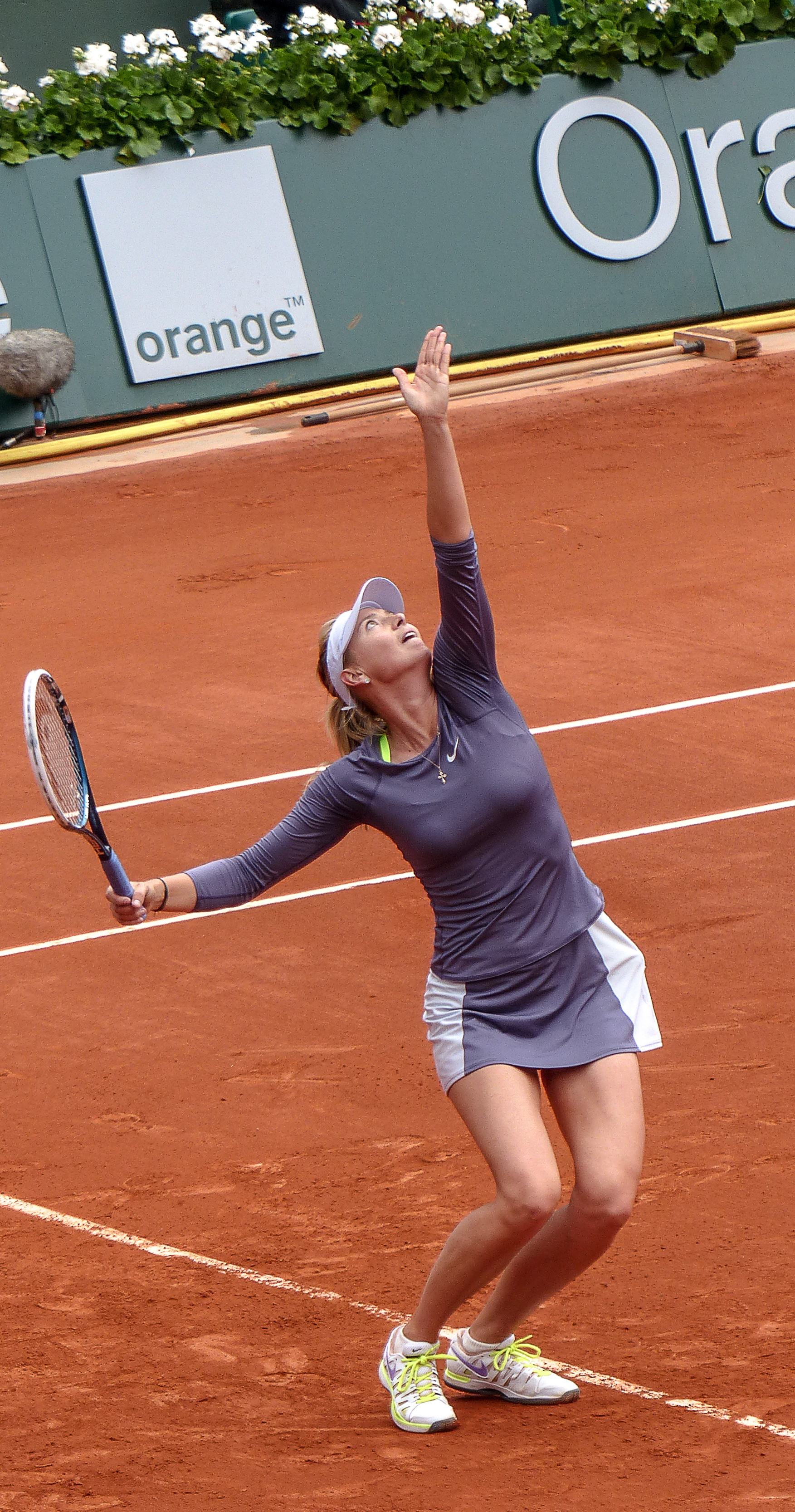 2ème tour Roland Garros 2013 : Maria Sharapova (RUS) vs Eugenie Bouchard (CAN)